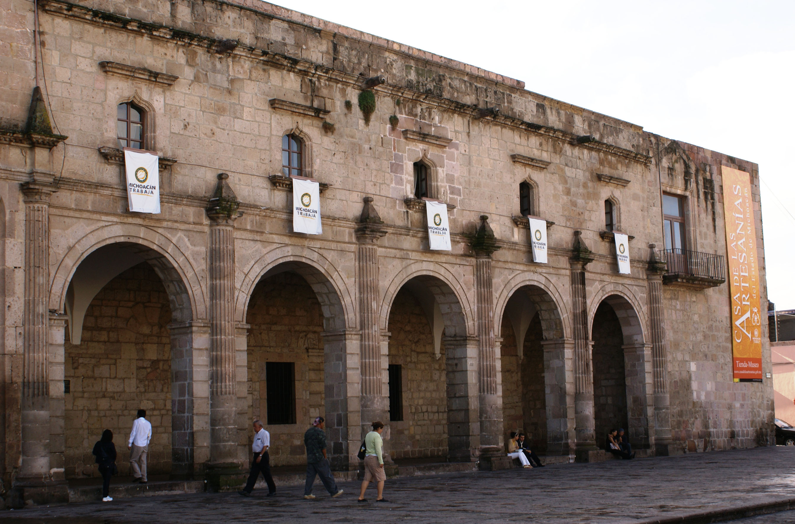 Casa de las Artesanías de Michoacán, recinto cultural público ubicado en la ciudad de Morelia, Michoacán, México; enfocado en la conservación y difusión del arte popular de las distintas regiones del estado, tiene su sede en un ex convento del siglo XVI.